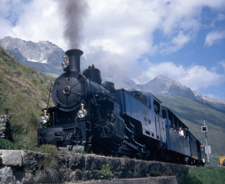 Description